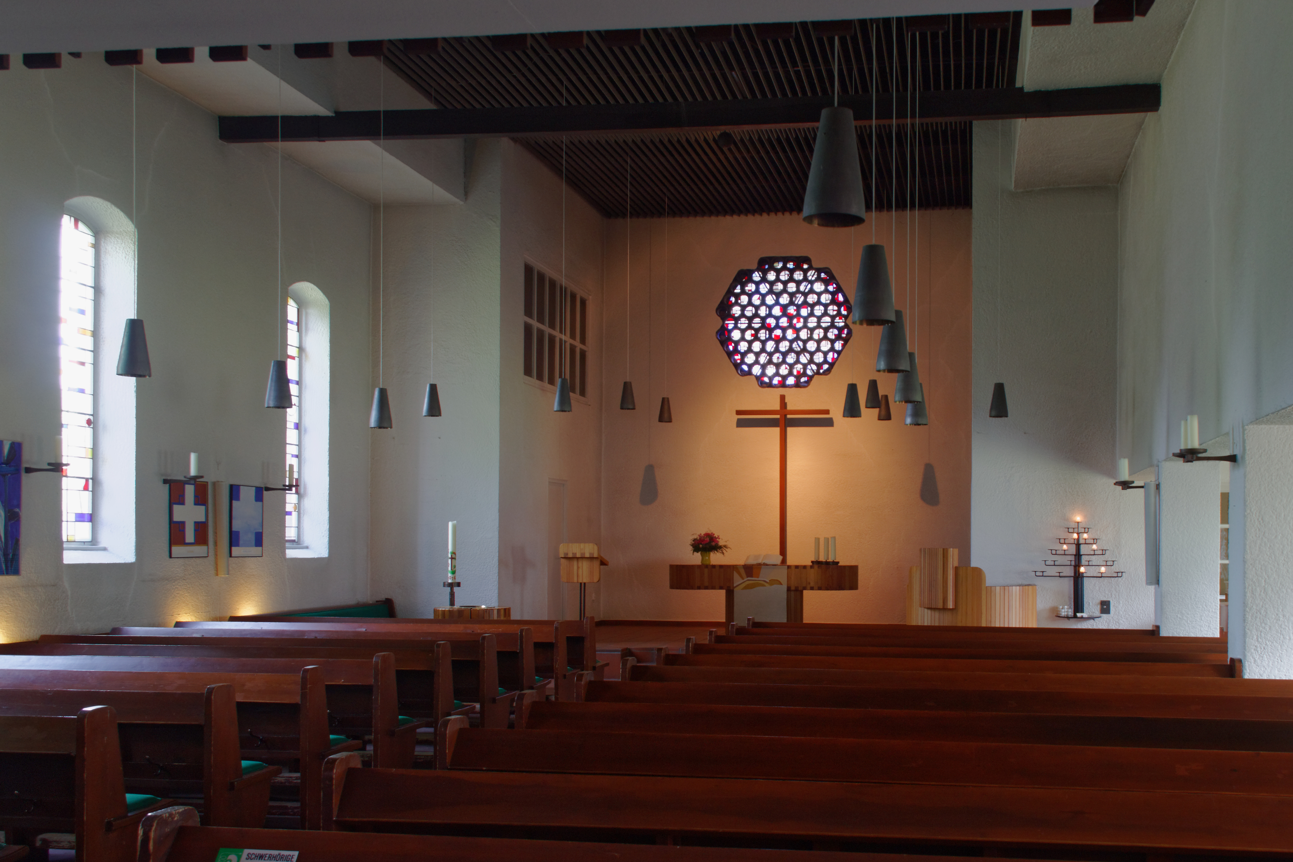 Rissen, Johanneskirche, Innenansicht